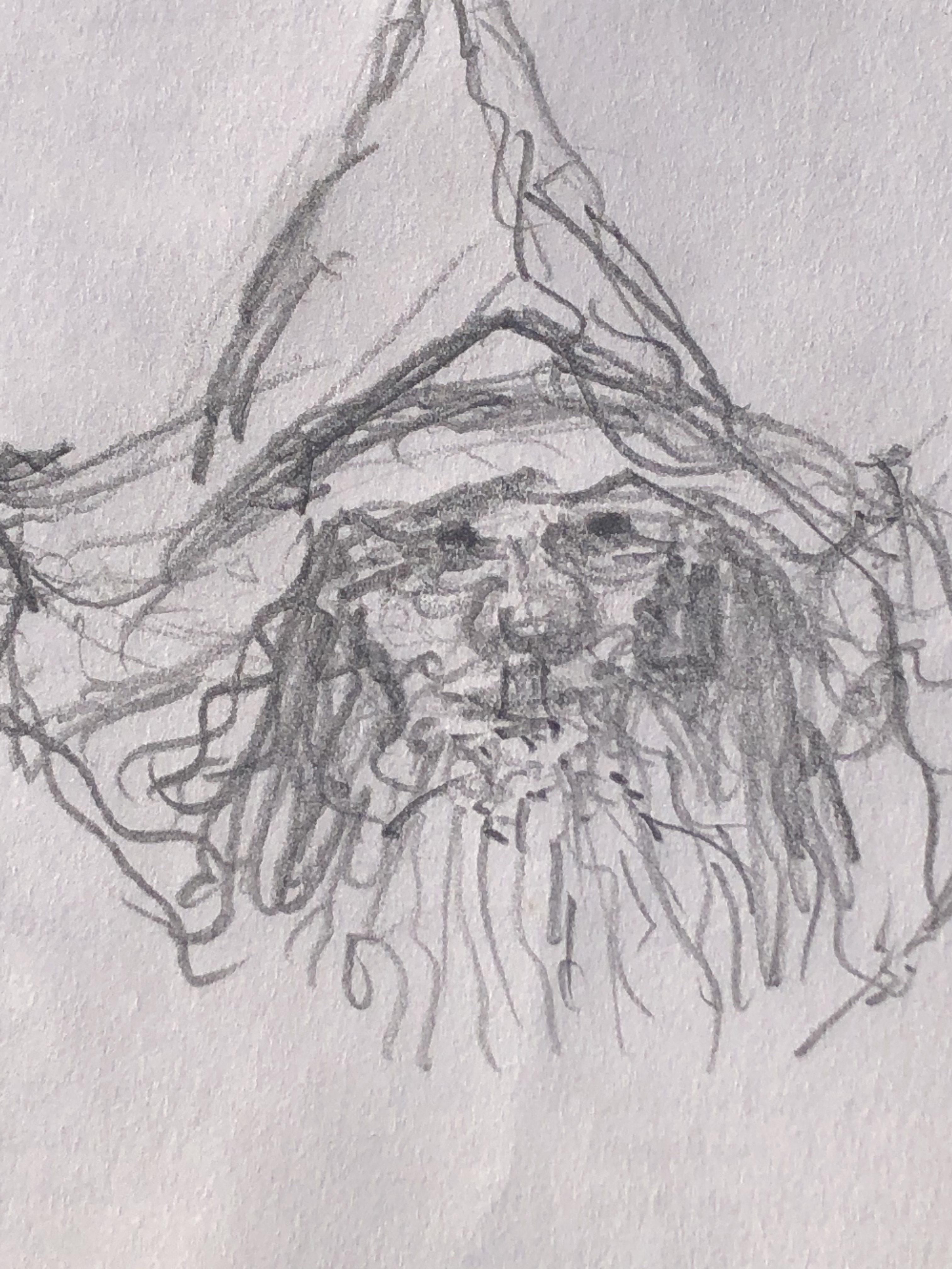 Haarmännchen - Sagengestalt aus dem Raum Haar (Gebirge) u. Möhne (Fluss), U.G.